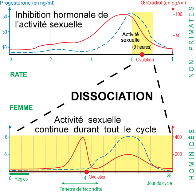 Chez les mammifères non-primates, et en particulier chez les femelles, les hormones inhibent les activités sexuelles lorsque l'organisme n'est pas fécondable. Mais des rongeurs jusqu'aux humains, au cours de l'évolution cérébrale, les activités sexuelles deviennent progressivement dissociées des cycles hormonaux. Chez l'être humain, il n'existe quasiment plus d'inhibitions saisonnières ou oestrales des activités sexuelles. Les activités sexuelles peuvent avoir lieu durant tout le cycle hormonal et à toutes les saisons de l'année. La sexualité est dissociée de la reproduction. (Courbes hormonales adaptées d'après THIBAULT C. , LEVASSEUR M.-C. (Eds). La reproduction chez les mammifères et l'homme. INRA Ellipse, 2001).